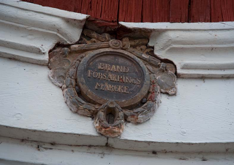 Bollnäs Ren 15:11. Brandförsäkringsmärke ovan entrédörren på huvudbyggnaden som byggdes år 1764. Hälsingegårdar. Motiv: Bollnäs Ren 15:11 Nyckelord: Byggnadsminnen, Riksintressen Kategori: Jordbruksegnahem Bollnäs Ren 15:11. Brandförsäkringsmärke ovan entrédörren på huvudbyggnaden som byggdes år 1764. Hälsingegårdar. Bollnäs Ren 15:11.